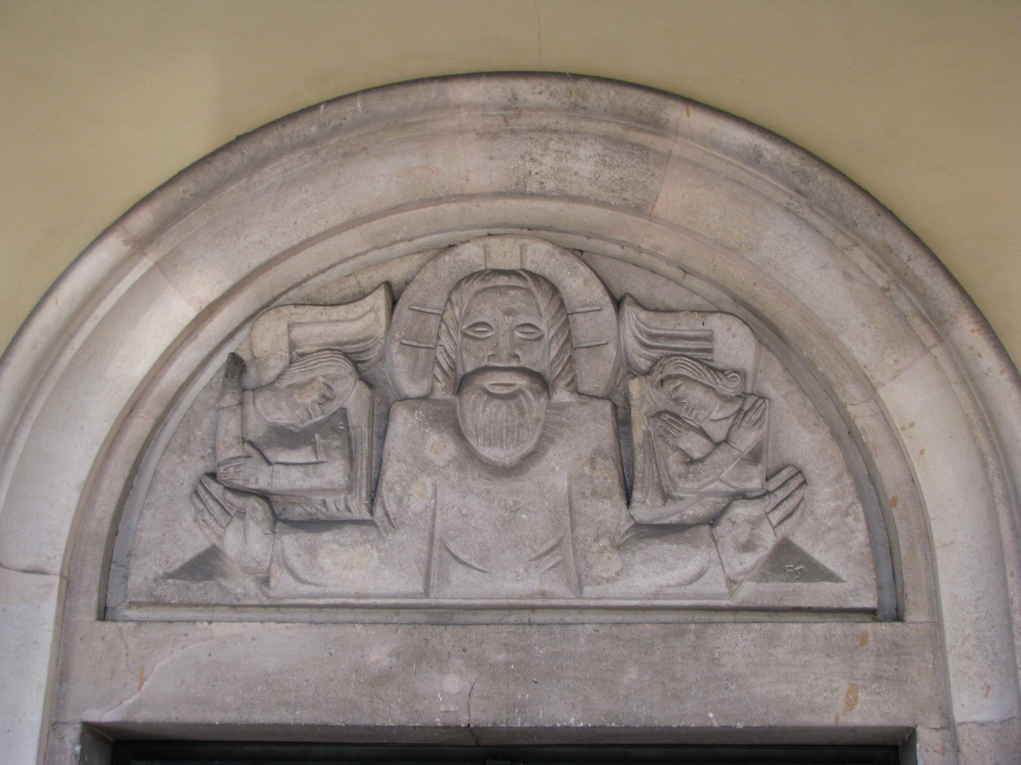 Westfriedhof Innsbruck, Tympanon über dem mittleren Portal der Kapelle. Relief Christus mit zwei Engeln von Franz Santifaller, 1927